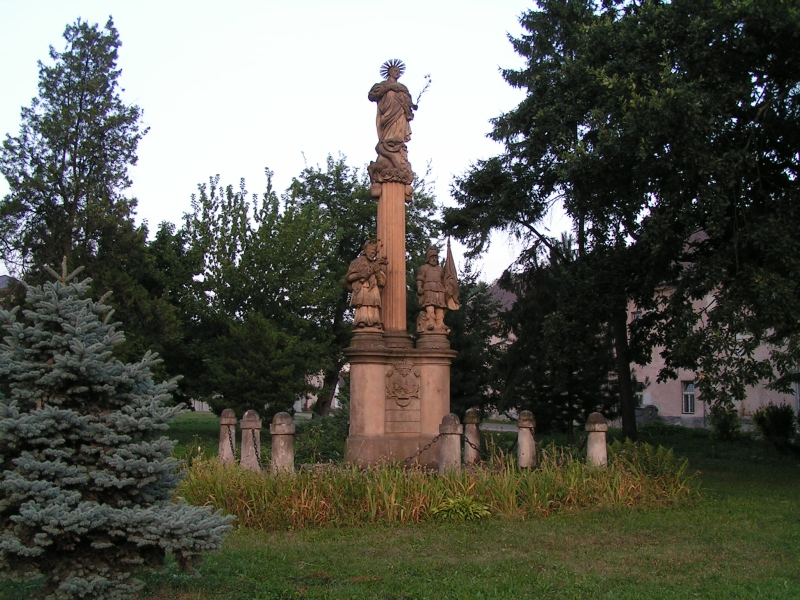 Mariánske súsošie ( Immaculata )